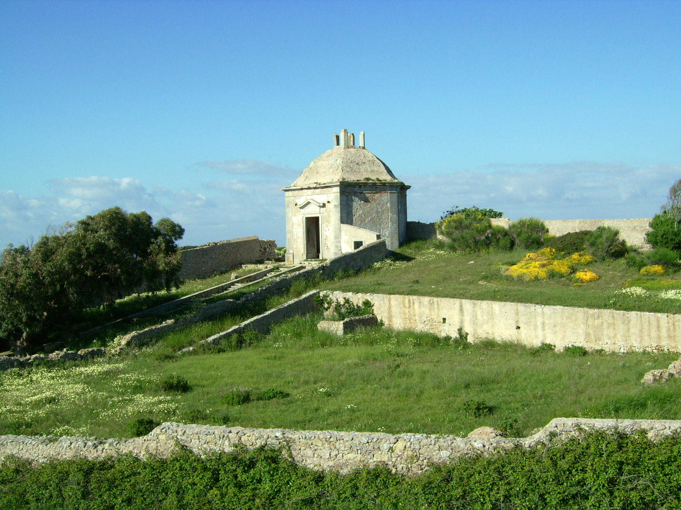 Casa da Água - Cabo Espichel - Sesimbra Local : Cabo Espichel / Sesimbra / Portugal user:sacavem (pt) (usuário:sacavem)